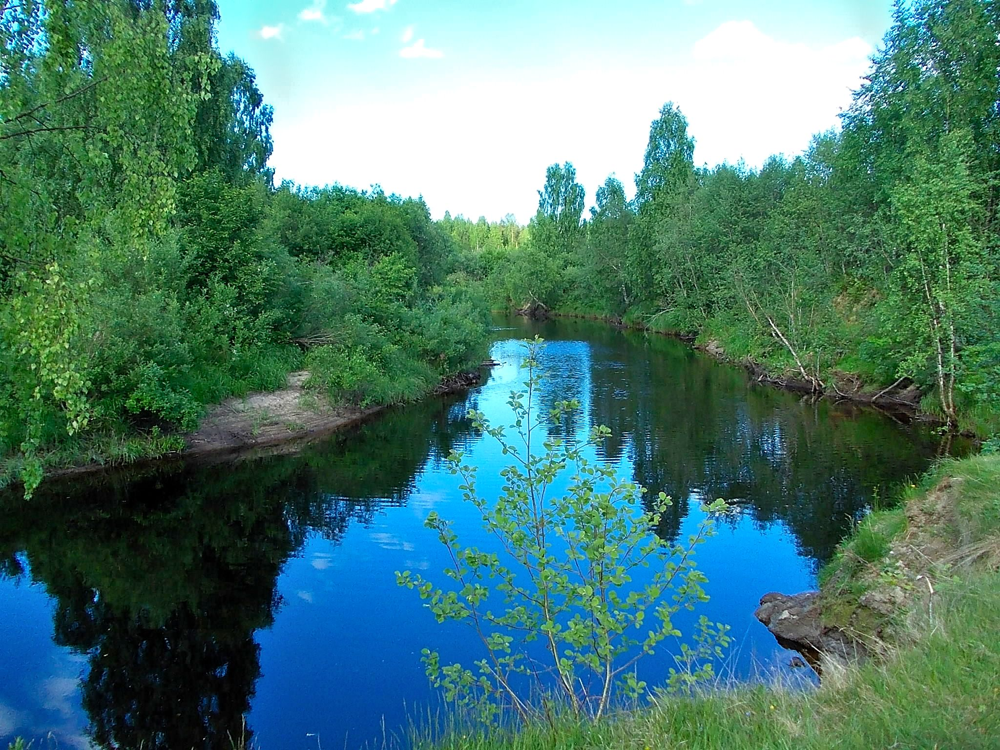 Река Шапша недалеко от устья